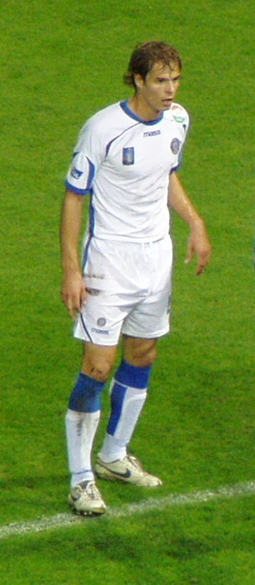 Lovre Vulin horvát labdarúgó (ZTE Aréna)